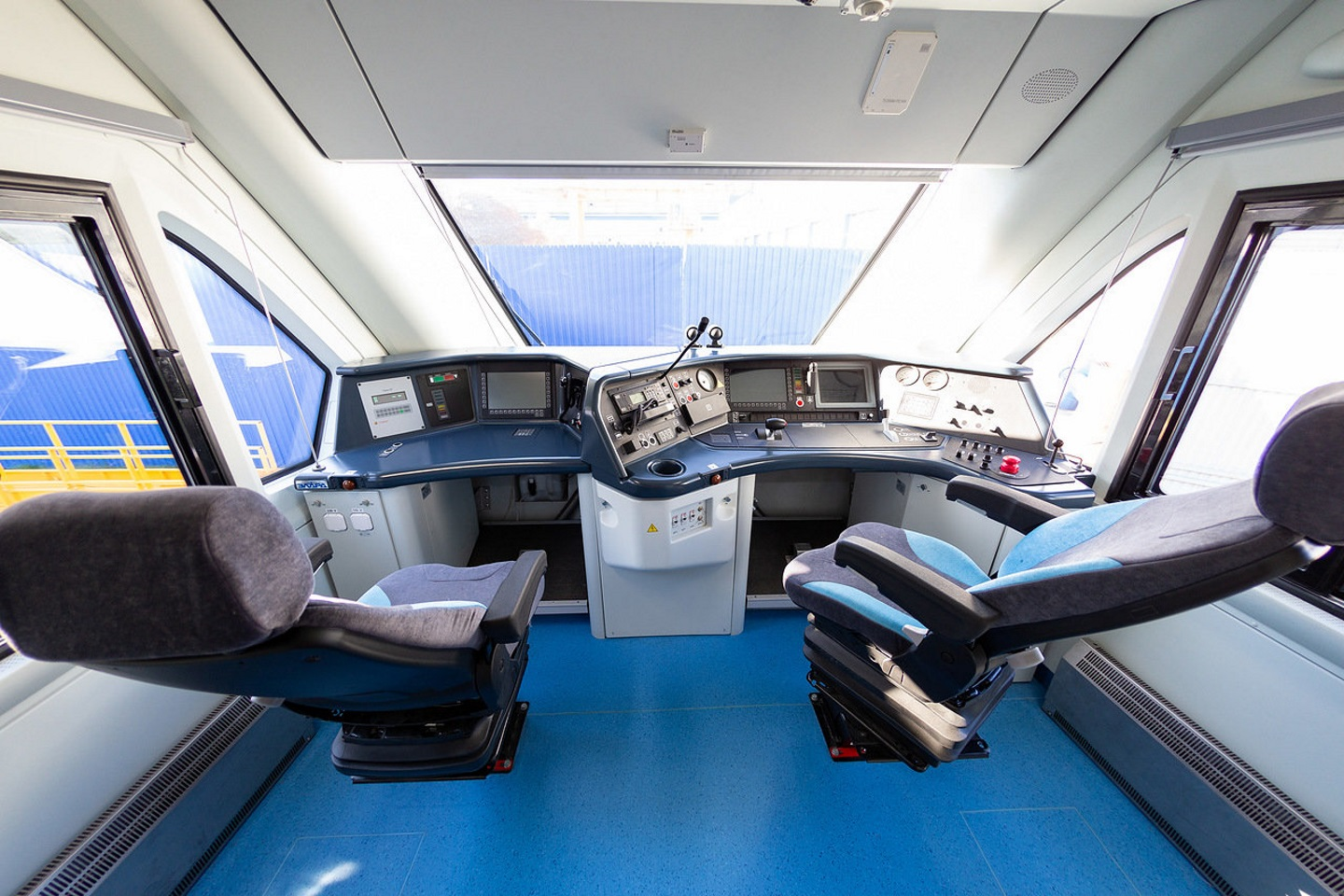 Интерьер ЭГ2Тв (МЦД)